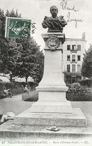 Carte postale ancienne du buste d'Étienne Poulet (Villefranche-sur-Saône).